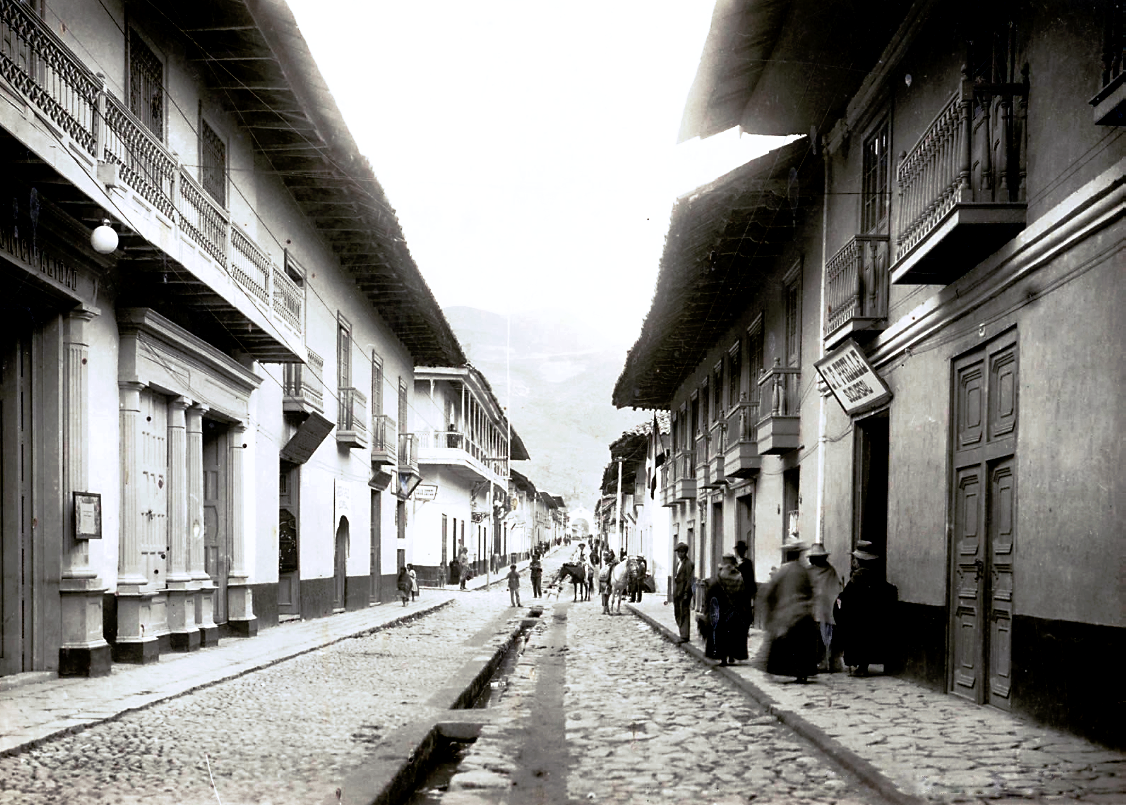 Año 1924, Jr. El Comercio. Foto perteneciente a la serie 'Cajamarca Tradicional', de la galería fotográfica de la web de la Municipalidad de Cajamarca Perú.